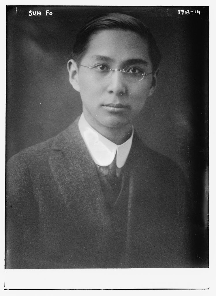 孫科青年照，攝於1916年